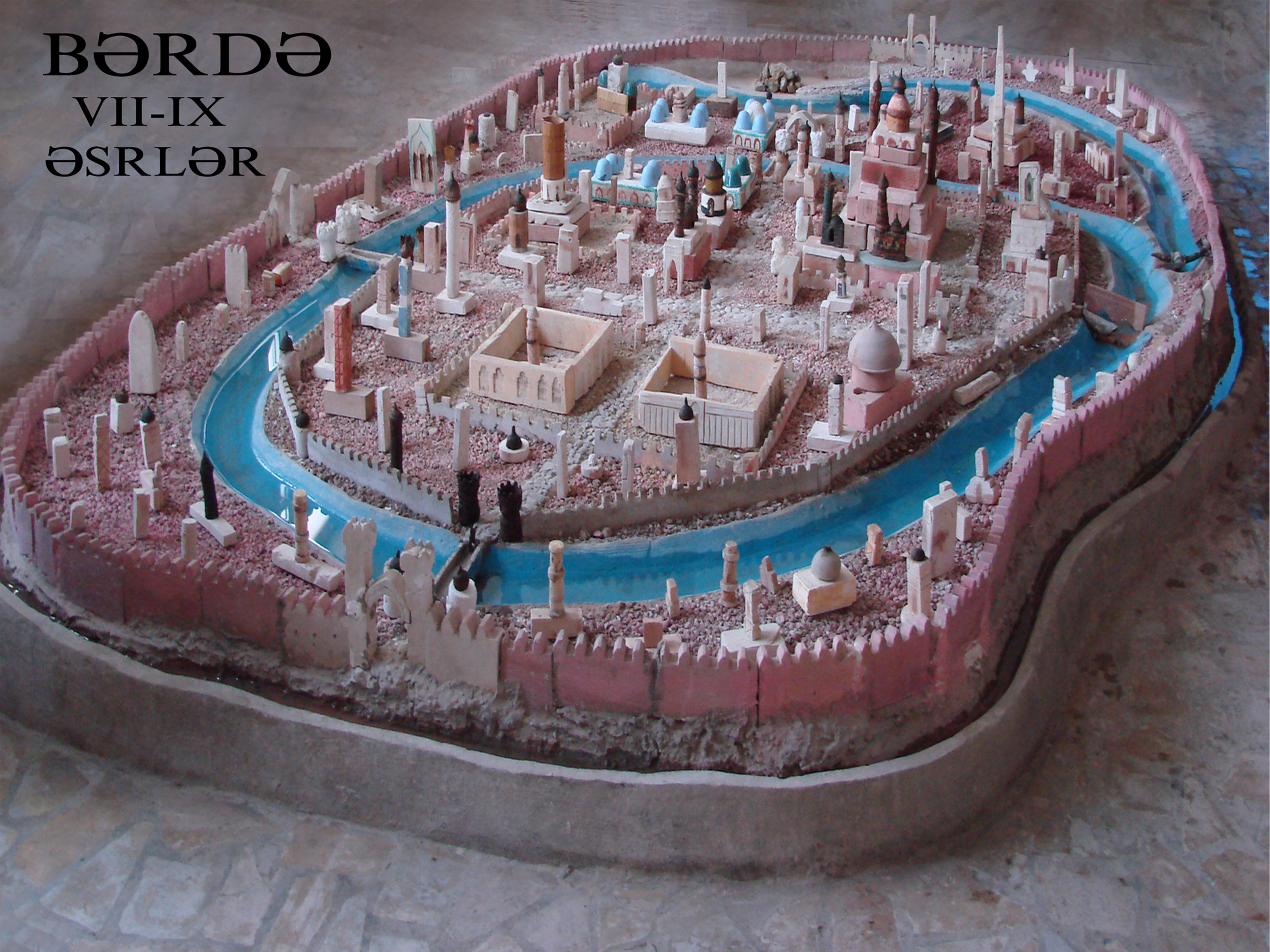 Bərdə VII-IX əsrlər (maket)